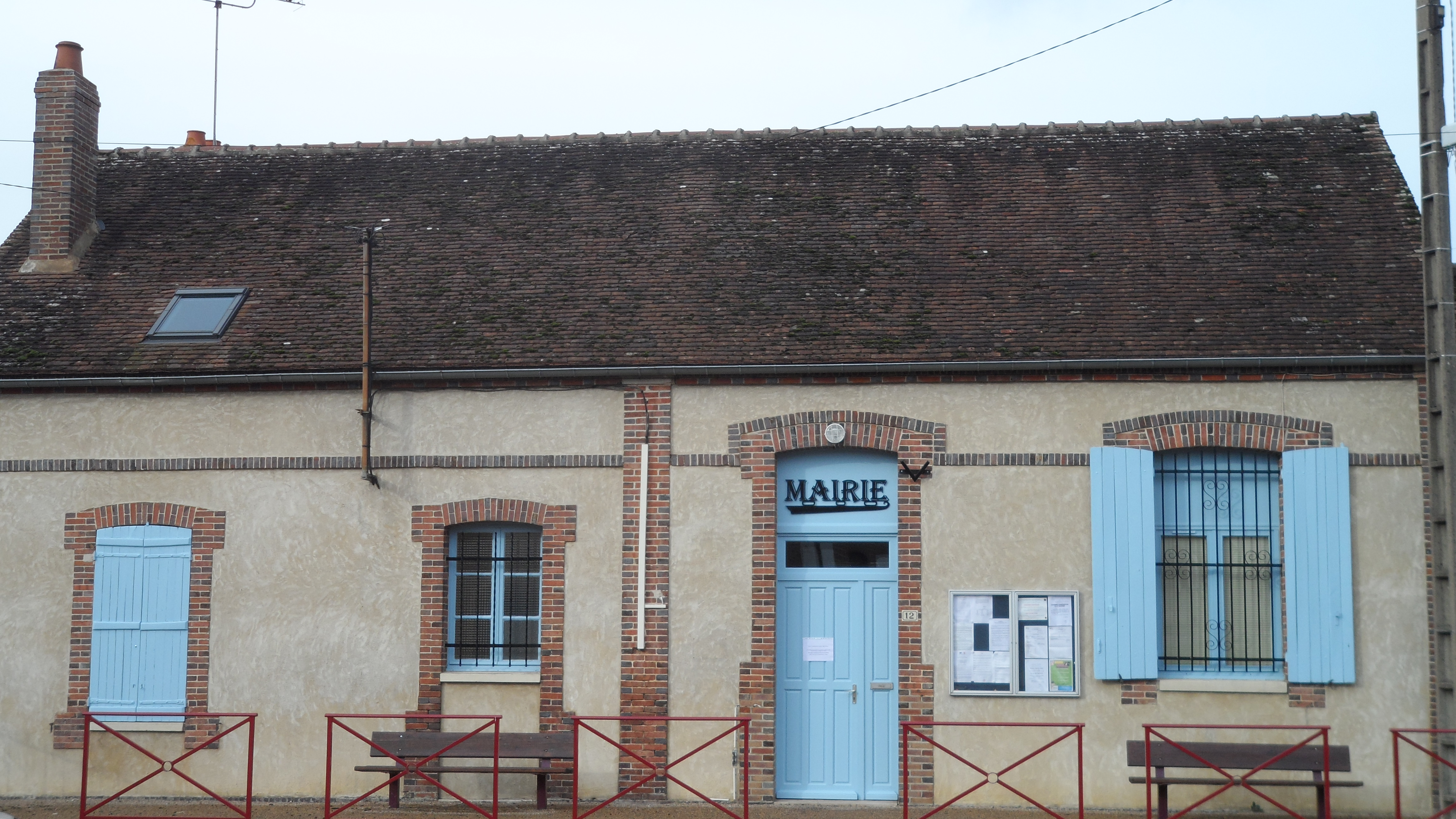 Mairie de Saint Martin d'Ordon (Yonne) France